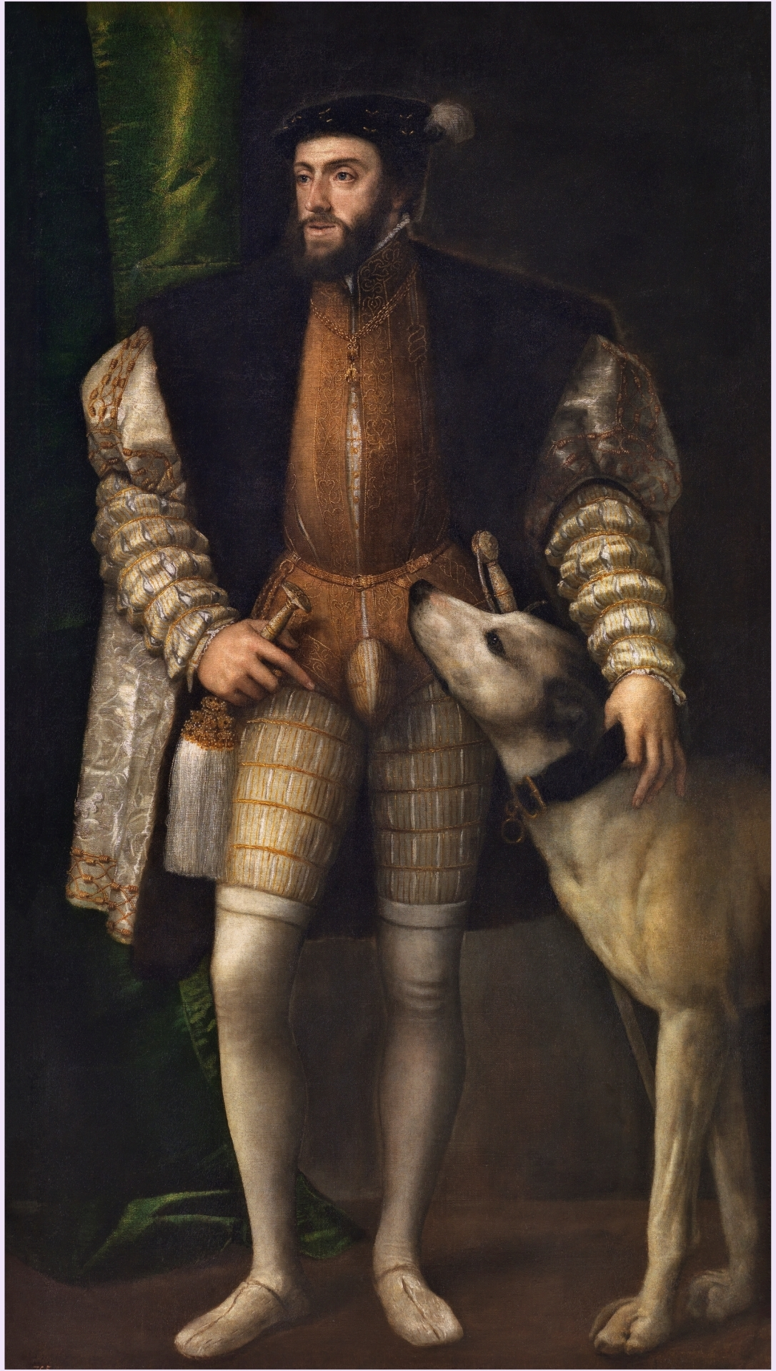 Retrato del emperador Carlos I de España (1500-1558), que aparece representado de cuerpo entero y junto a un perro.